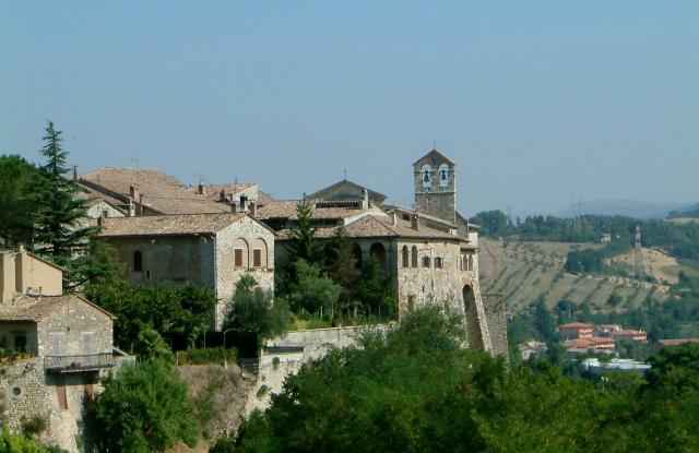 Il centro storico di Sangemini.Foto di Alberto Subioli (2004)